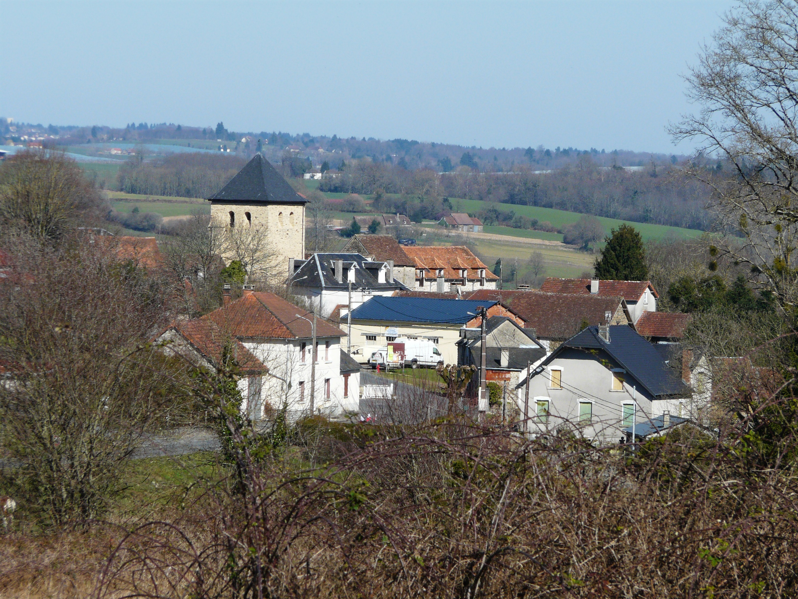 Le village de Sarlande, Dordogne, France.